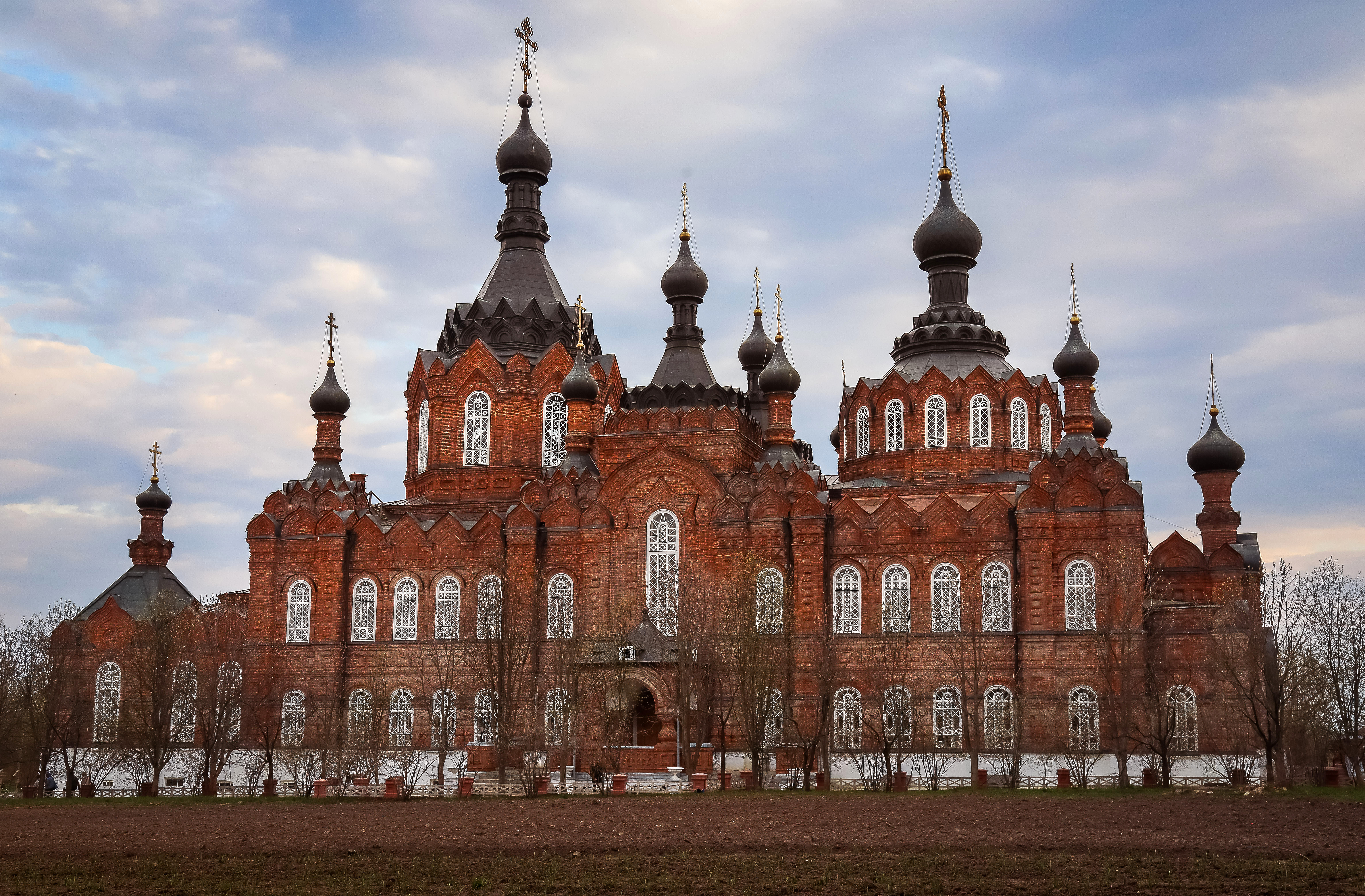 Казанский собор (архитектор С. В. Шервуд). Казанская Амвросиевская ставропигиальная женская пустынь. Шамордино, Калужская область.